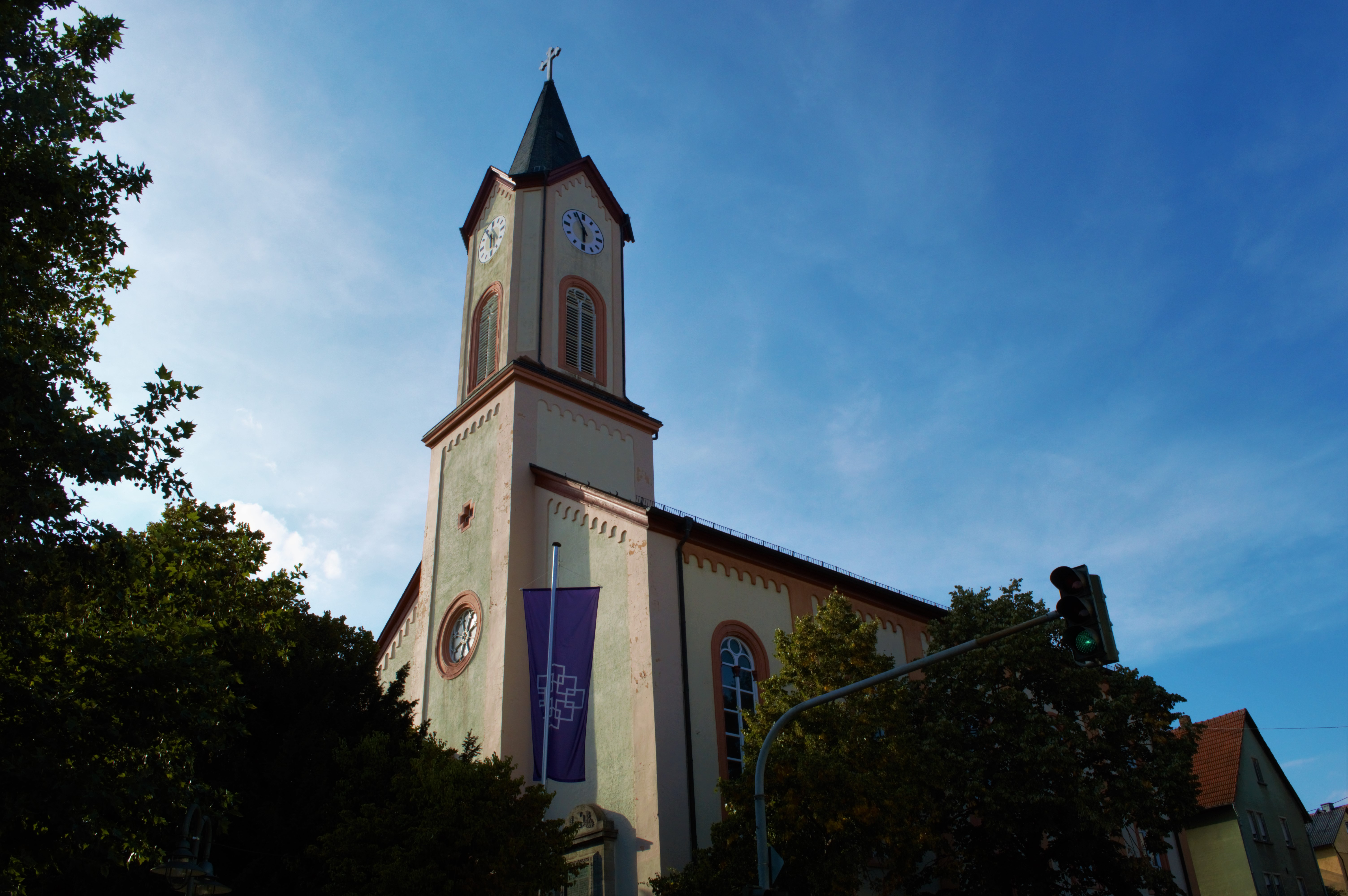 Kirche Eschbach von schräg-unten